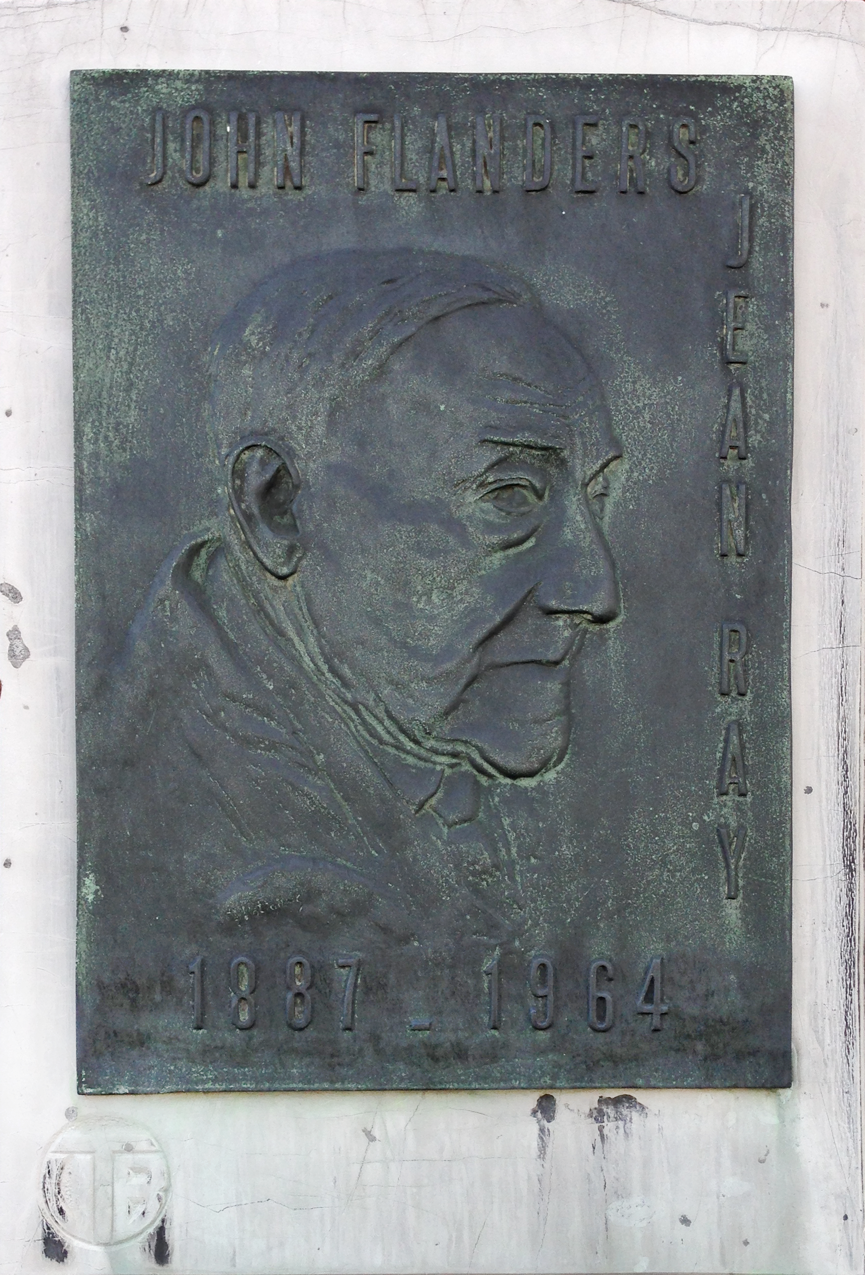 Gedenkplaat John Flanders in Gent